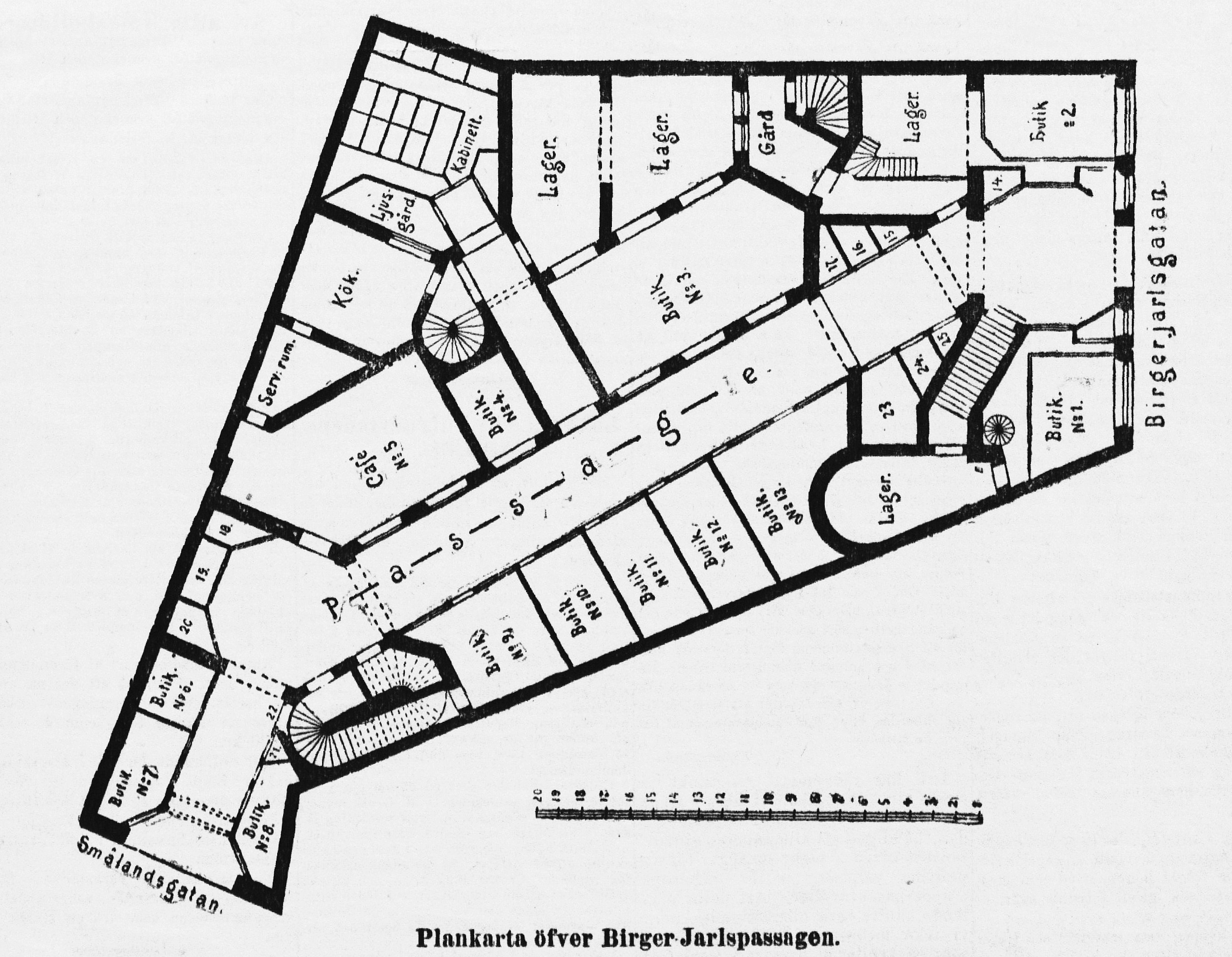 Planritning över Birger Jarlspassagen